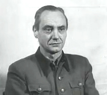 Foto Hermann Pook